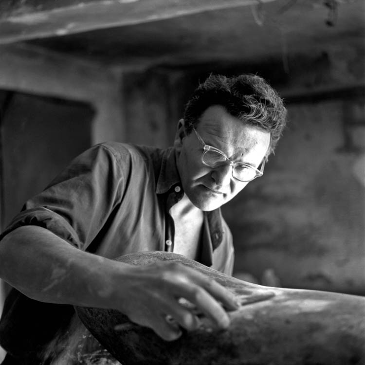 Srpskohrvatski / српскохрватски: Vojin Bakić u ateljeu